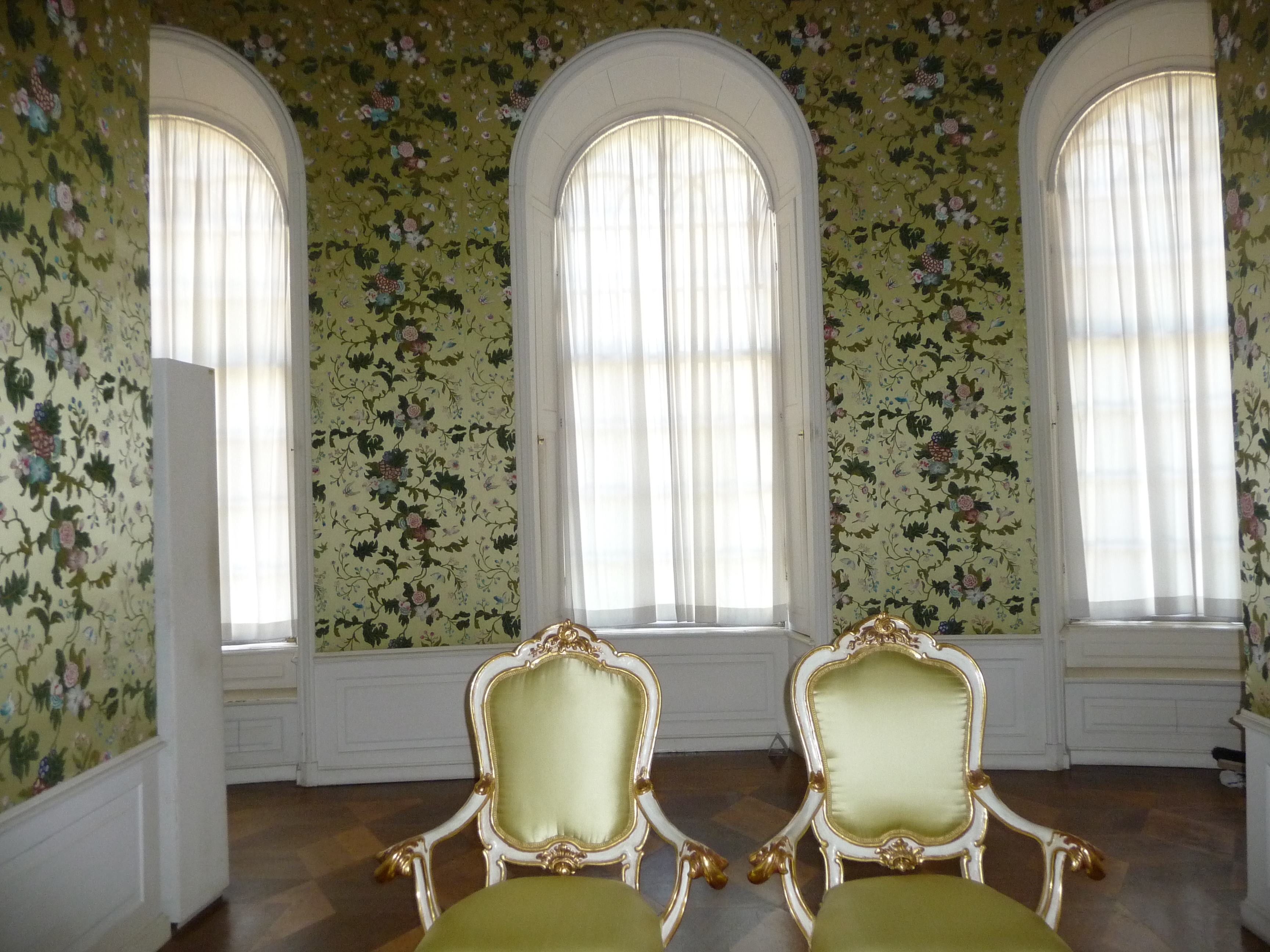 Innenansicht Chinesisches Teehaus in der Potsdamer Parkanlage Sanssouci